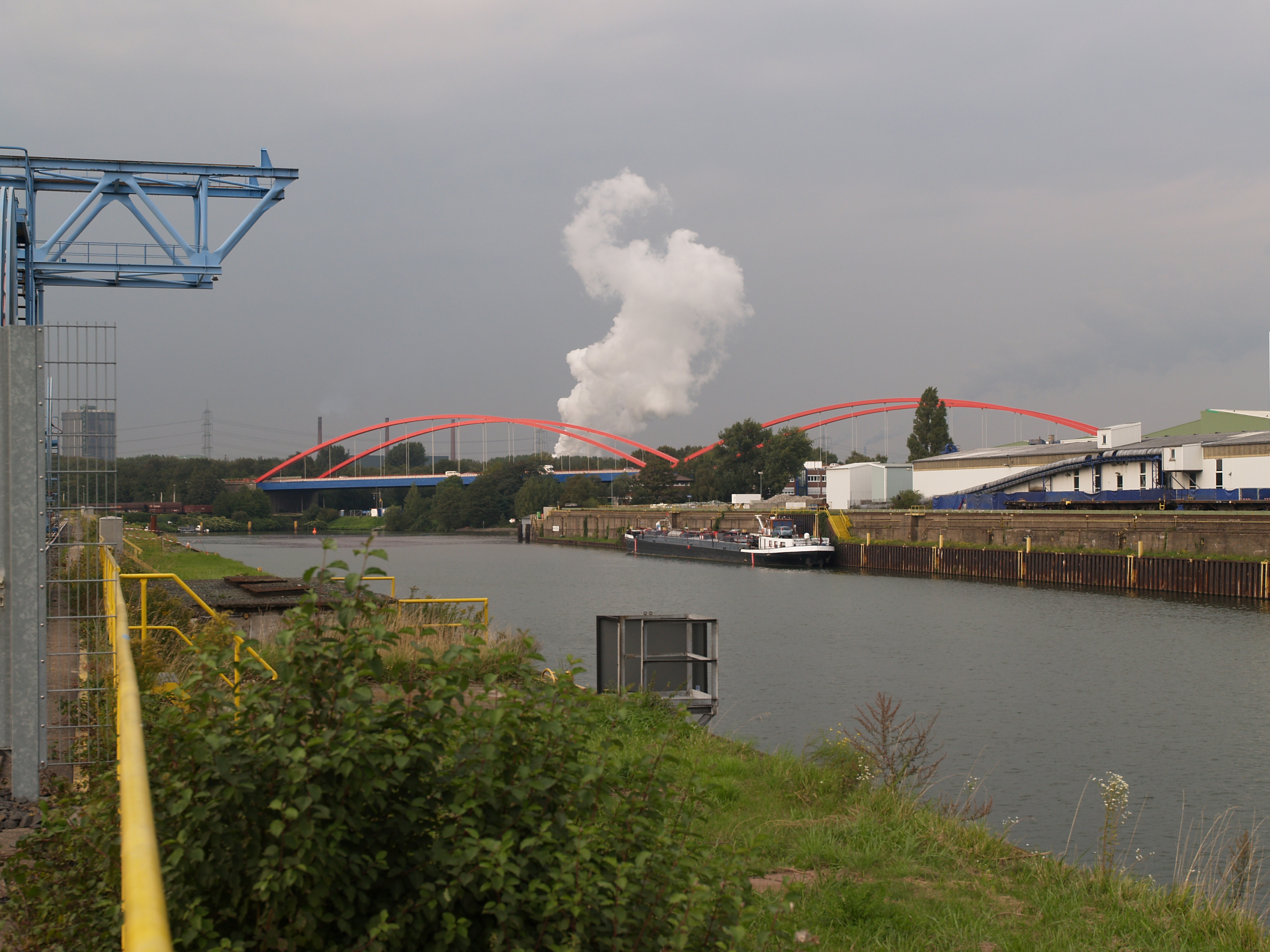 Stadthafen Essen am Rhein-Herne-Kanal, großes Hafenbecken, im Hintergrund die Brücke der A42 und eine Dampfsäule vom Löschturm der Kokerei Prosper in Bottrop